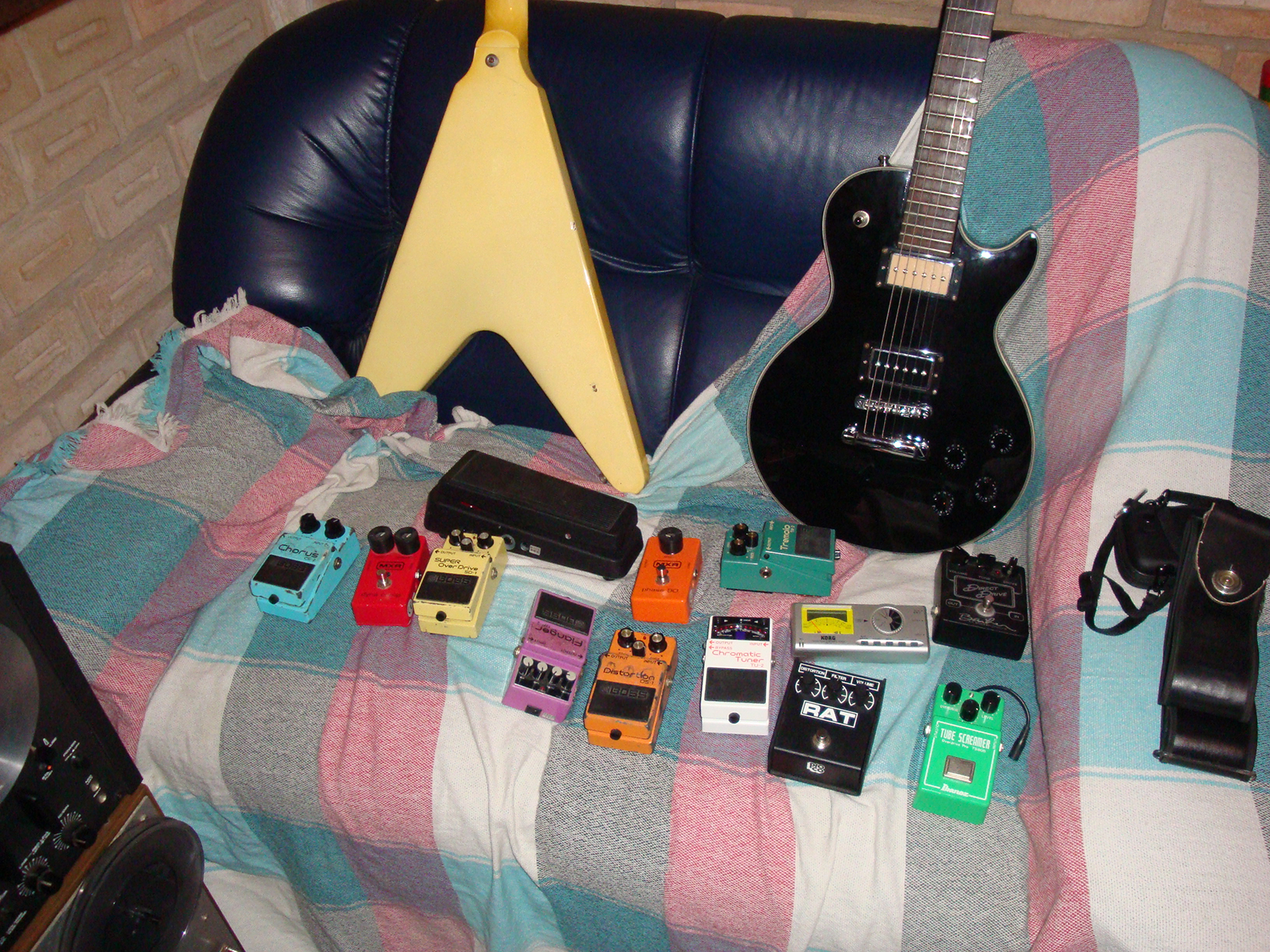 Nada como uns brinquedinhos, hehe.